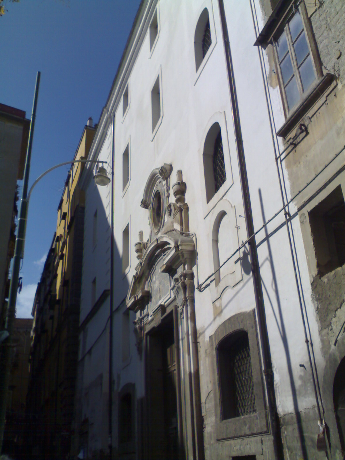 Santa Maria della Fede's Oratory: Portal